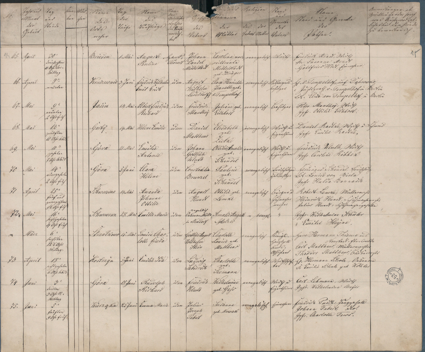 numer 66